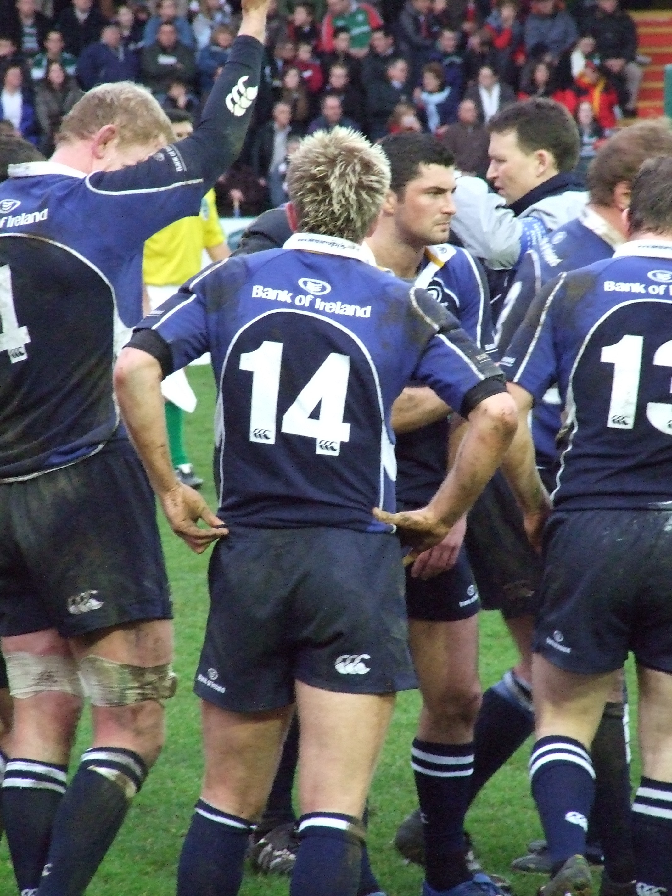 Leicester Tigers v Leinster - 19 January 2008 (70) - Poule 6 6°journée Heineken Cup - Welford Road, Leicester Leicester Tigers 25 - 9 Leinster